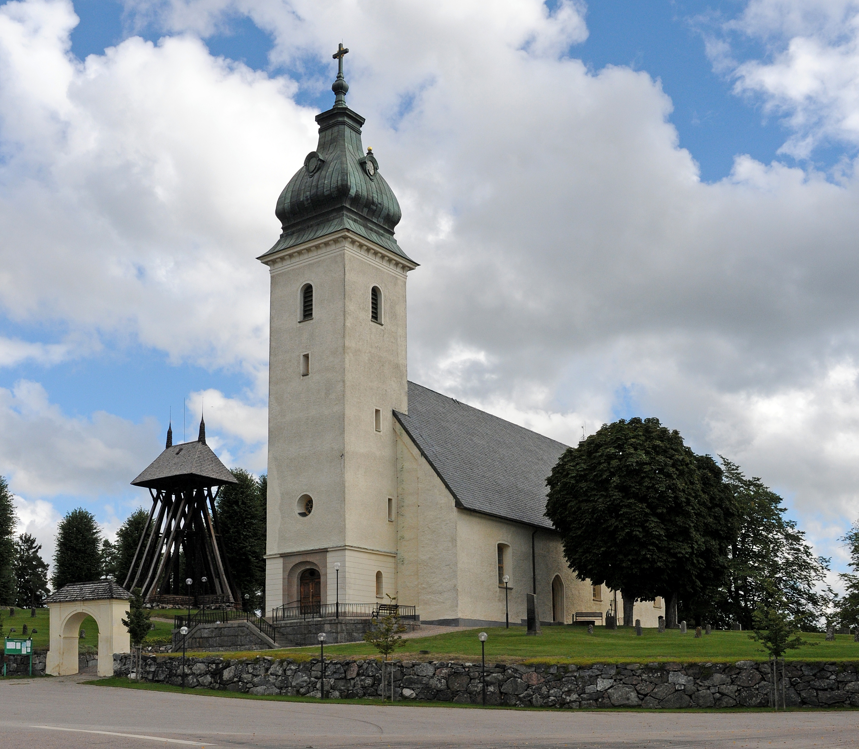 Bettna kyrka i september 2010